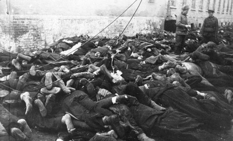 Zuchthaus Sonnenburg, ermordete Gefangene Zentralbild. II.Weltkrieg 1939-45. An der Front vor Küstrin, März 1945. Vor dem Anrücken der Roten Armee wurden im Zuchthaus Sonnenburg/Neumark 8.000 Insassen von den Faschisten in den Zuchthaushöfen ermordet [siehe nachstehende Notiz]. [Zuchthaus Sonnenburg (Neumark).- Sowjetische Soldaten zwischen ermordeten Häftlingen stehend]